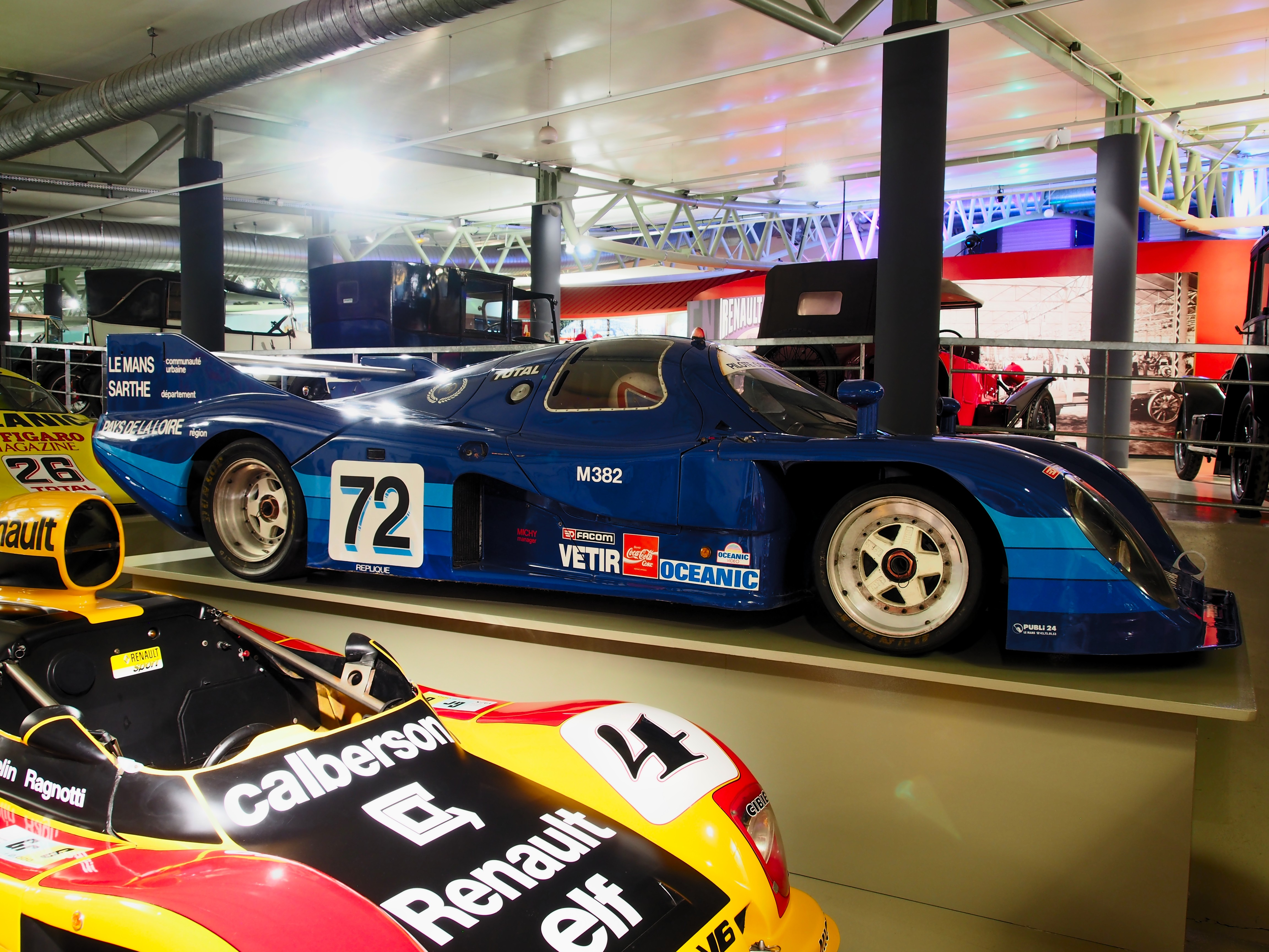 Photographed at Musée des 24 Heures du Mans, France.